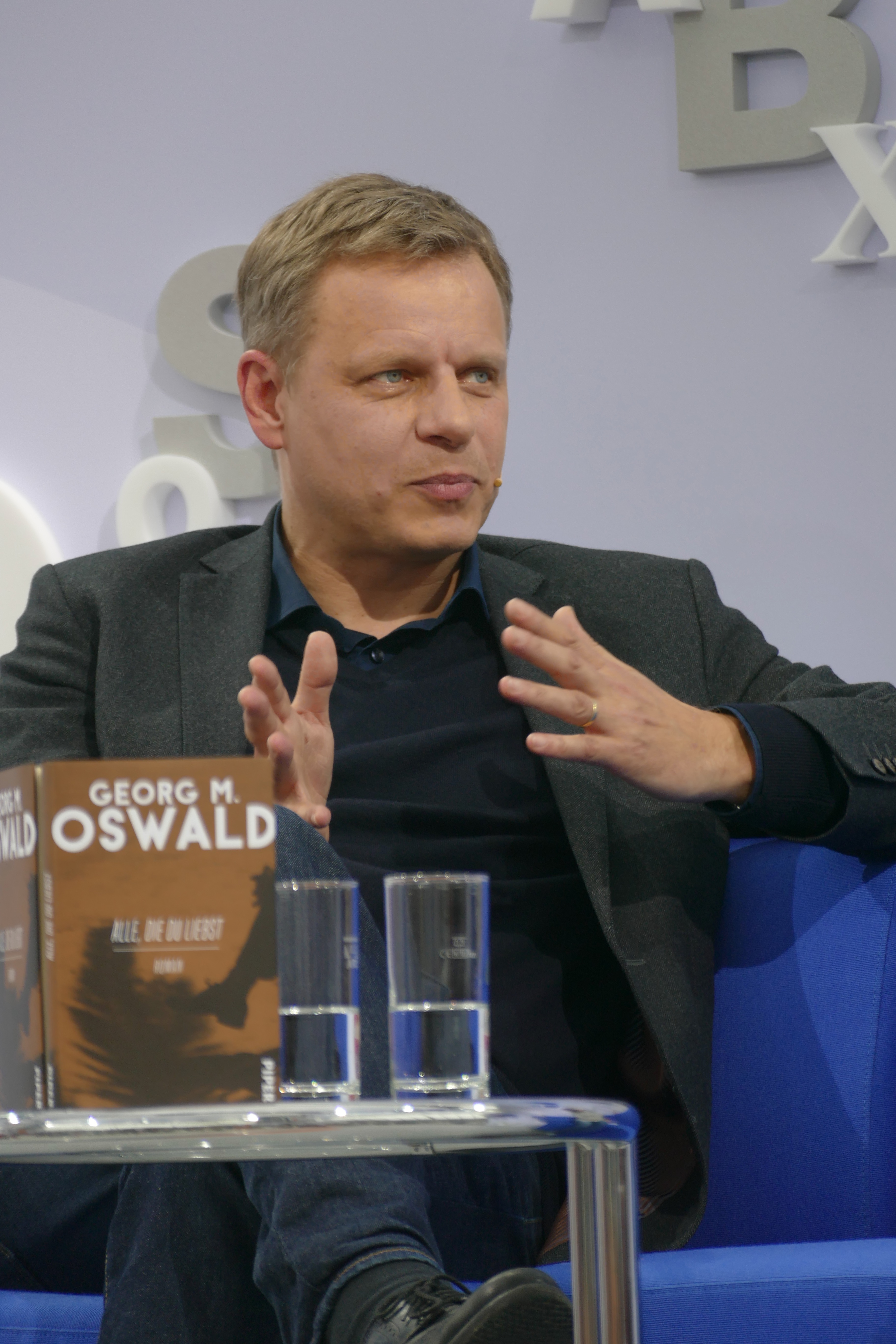 Georg M. Oswald stellt auf der Leipziger Buchmesse seinen Roman "Alle, die du liebst" vor.